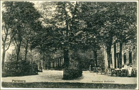 Ansichtskarte des Forsthauses Bollbrück südlich von Perleberg, um 1910.